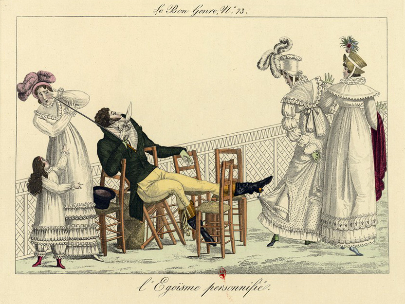 Gravure coloriée à la main de la série Le Bon Genre publiée par Pierre de la Mésangère.